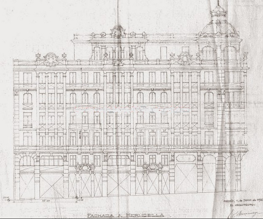 Proyecto de la fachada del Teatro Infanta Beatriz de Madrid en 1923. Museo Municipal de Madrid.